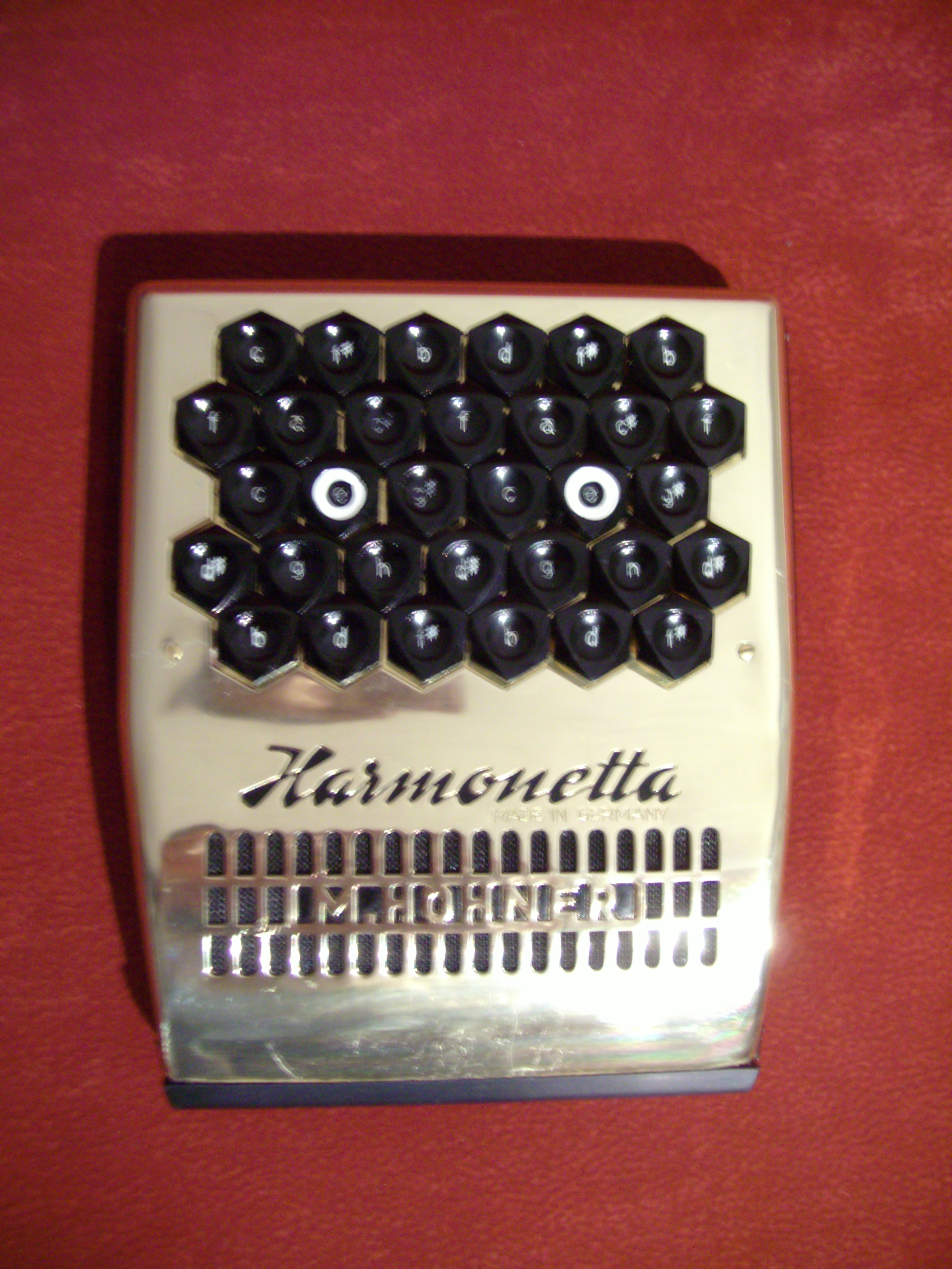 Harmonetta Oberseite